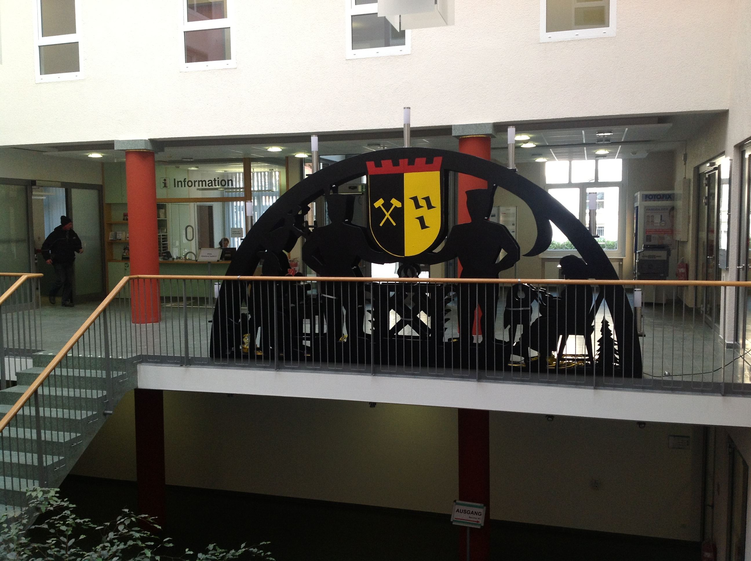 Rathaus Gladbeck.